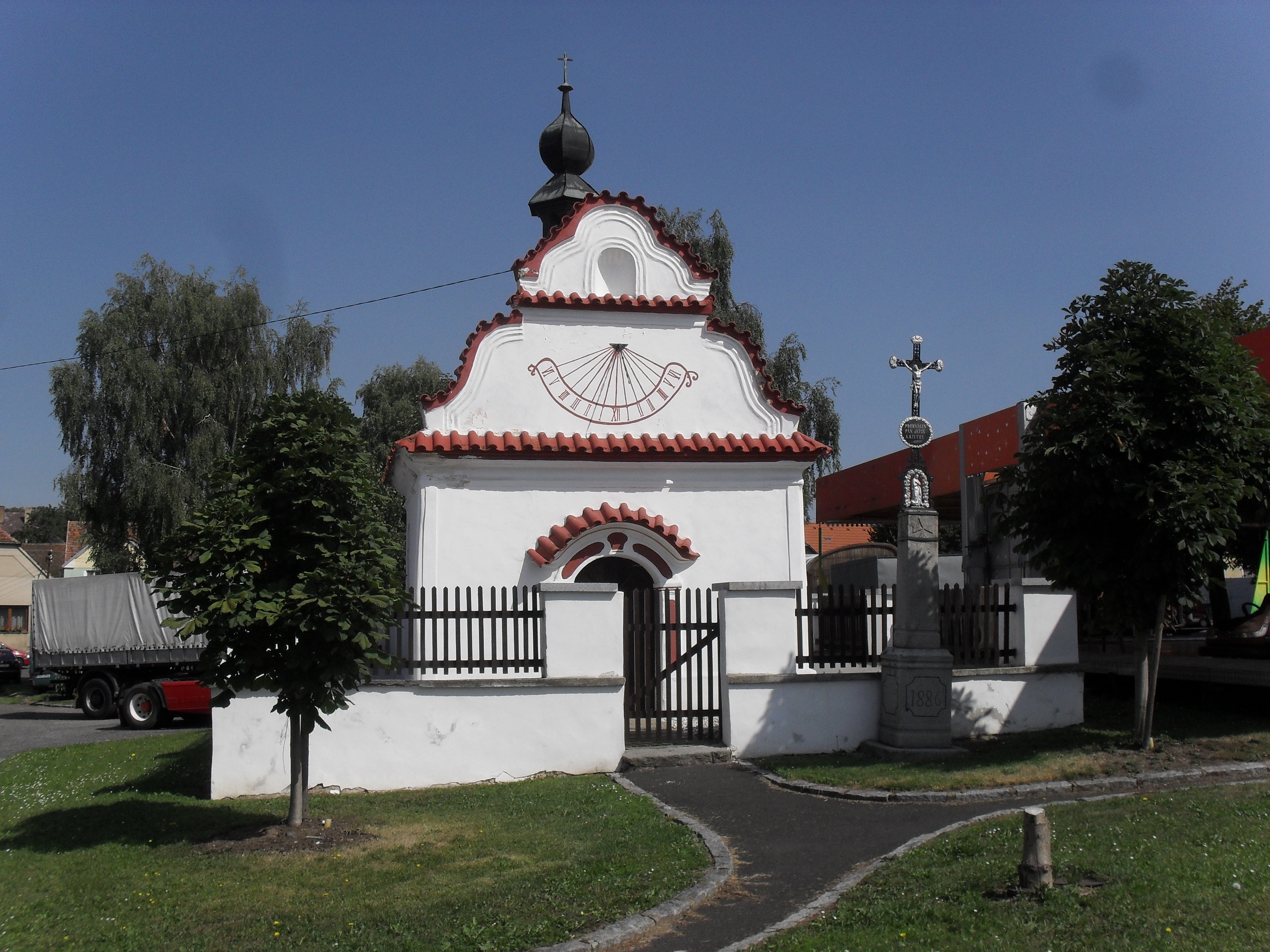 Fotografie pořízena v obci Svéradice.